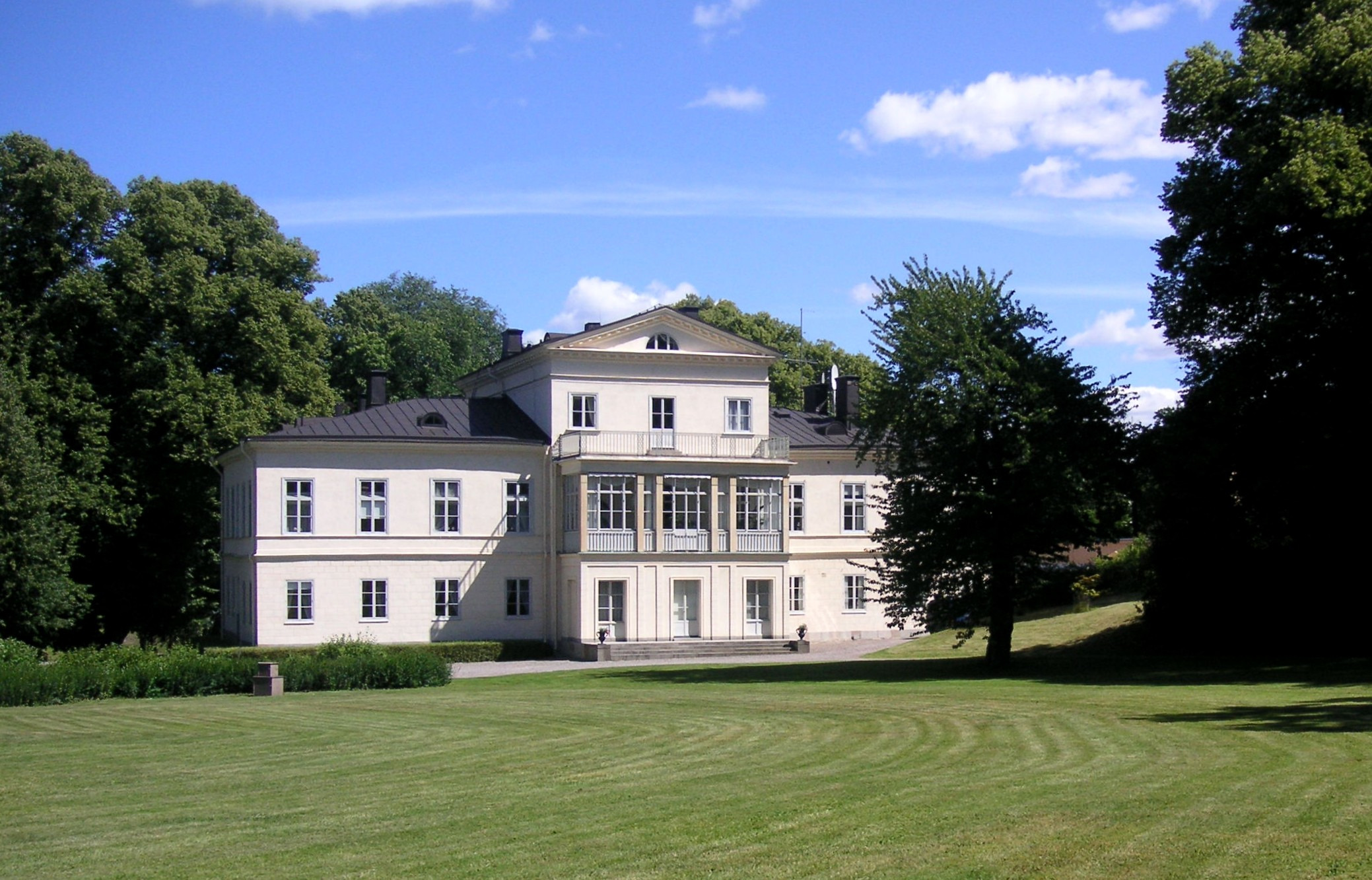 Haga slott i Hagaparken (sida mot trädgården)